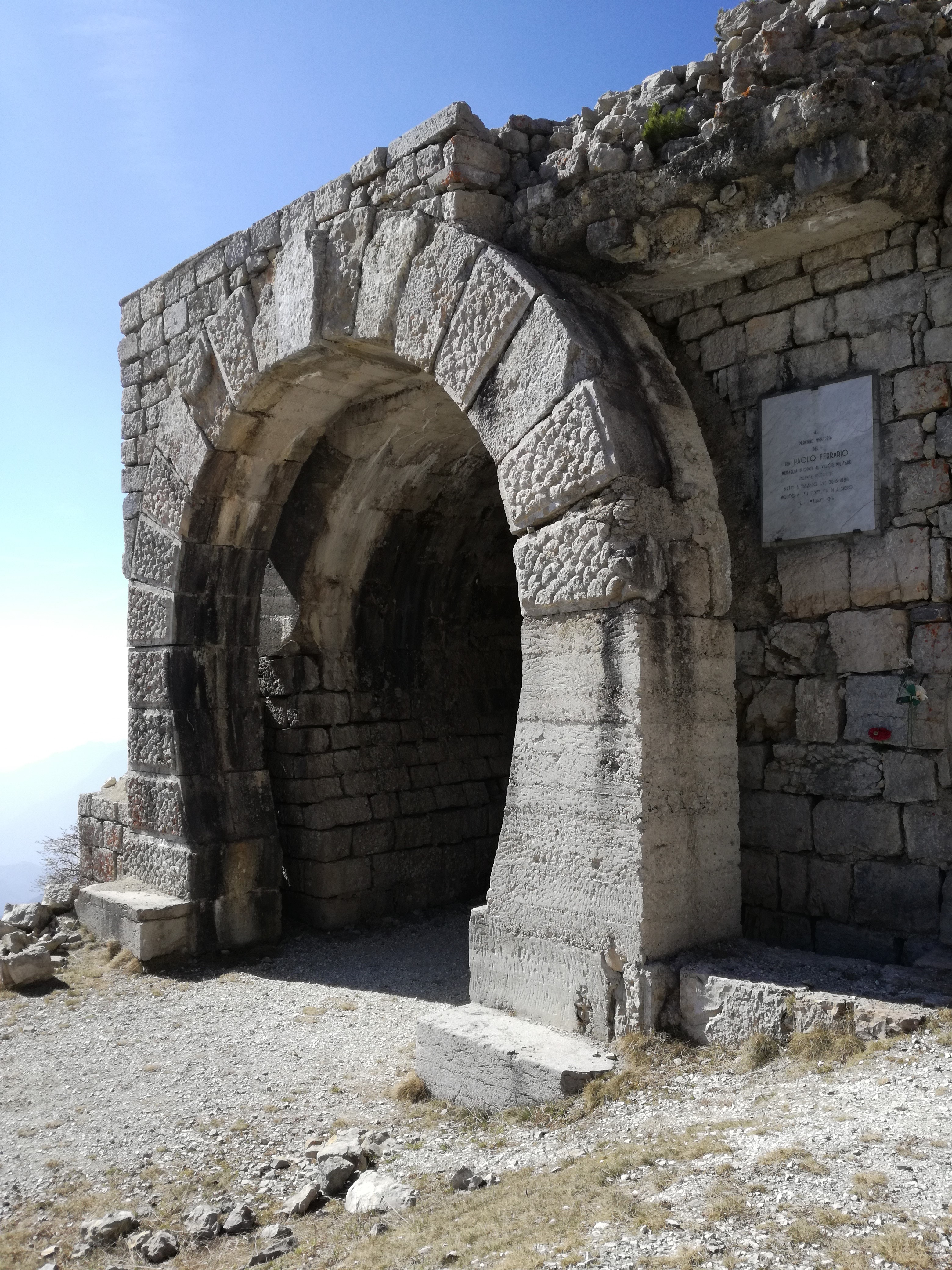 Forte Campomolon - Eine der beiden Gedenktafeln für den italienischen Leutnant der Genietruppen Paolo Ferrario der bei der Sprengung der Anlage tödlich verletzt wurde